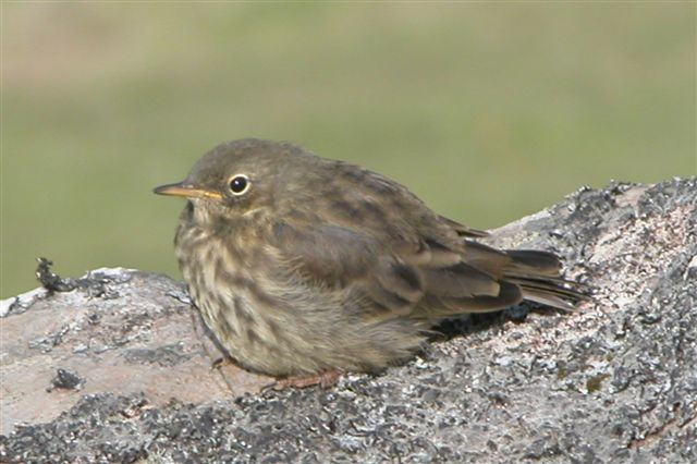 Rock Pipit, Anthus petrosus kleinschmidti, Suðuroy